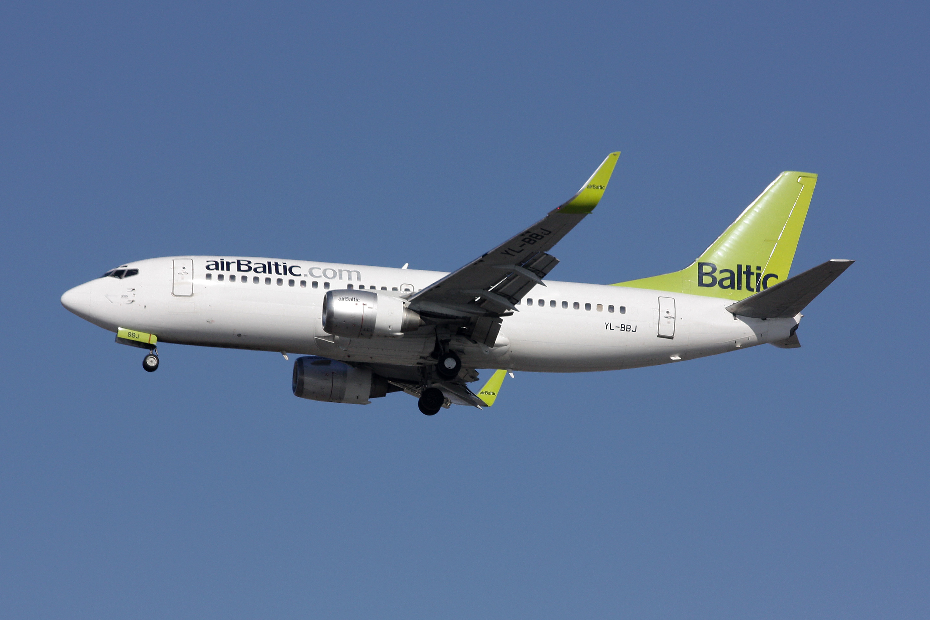 Boeing 737-800 YL-BBJ de la compagnie aérienne lettonnne Air Baltic en finale pour la piste 27R à CDG/LFPG.